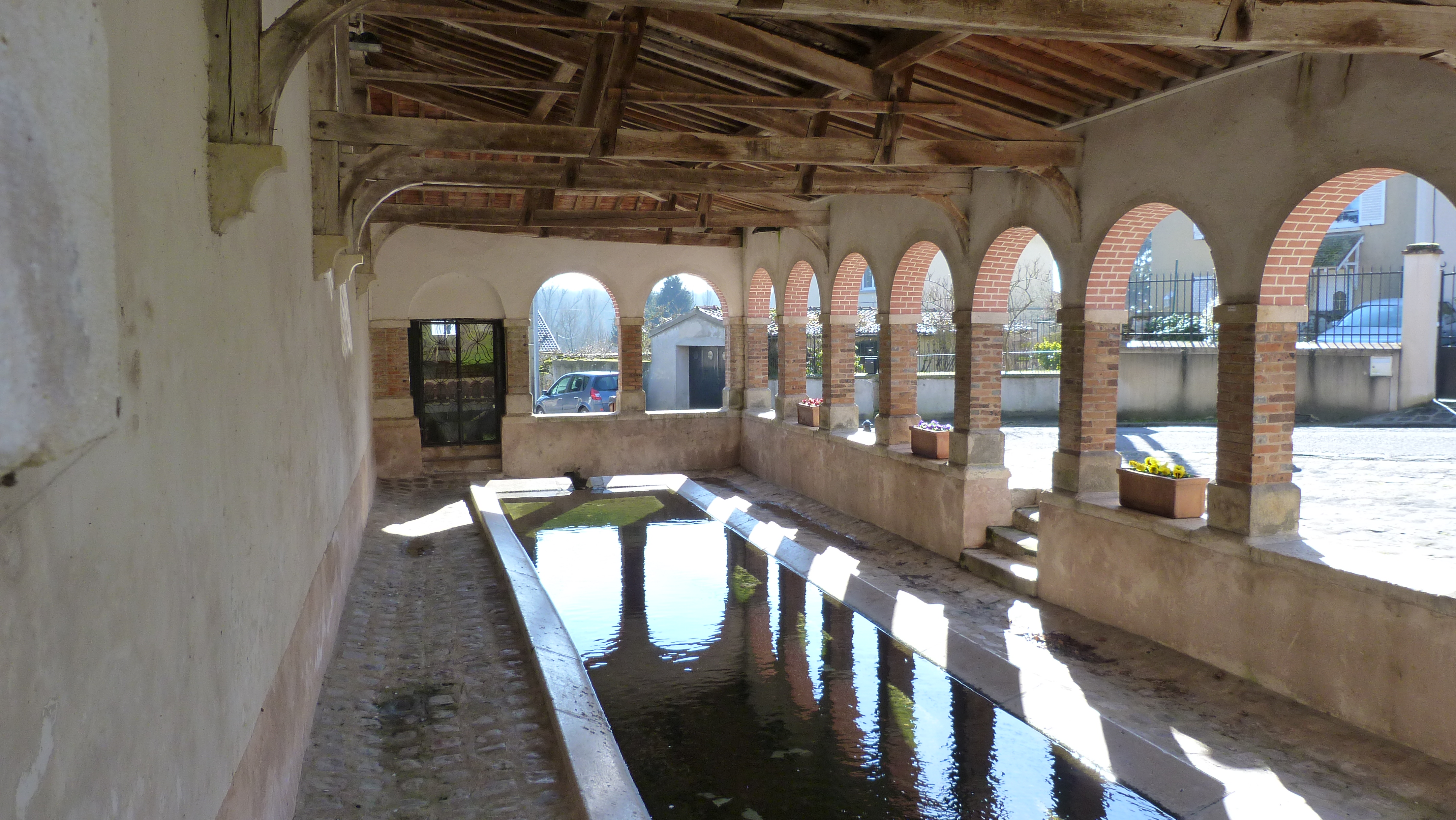 Lavoir sur la commune française d'Ozouer-le-Voulgis, vue d'intérieur, prise en Janvier 2015